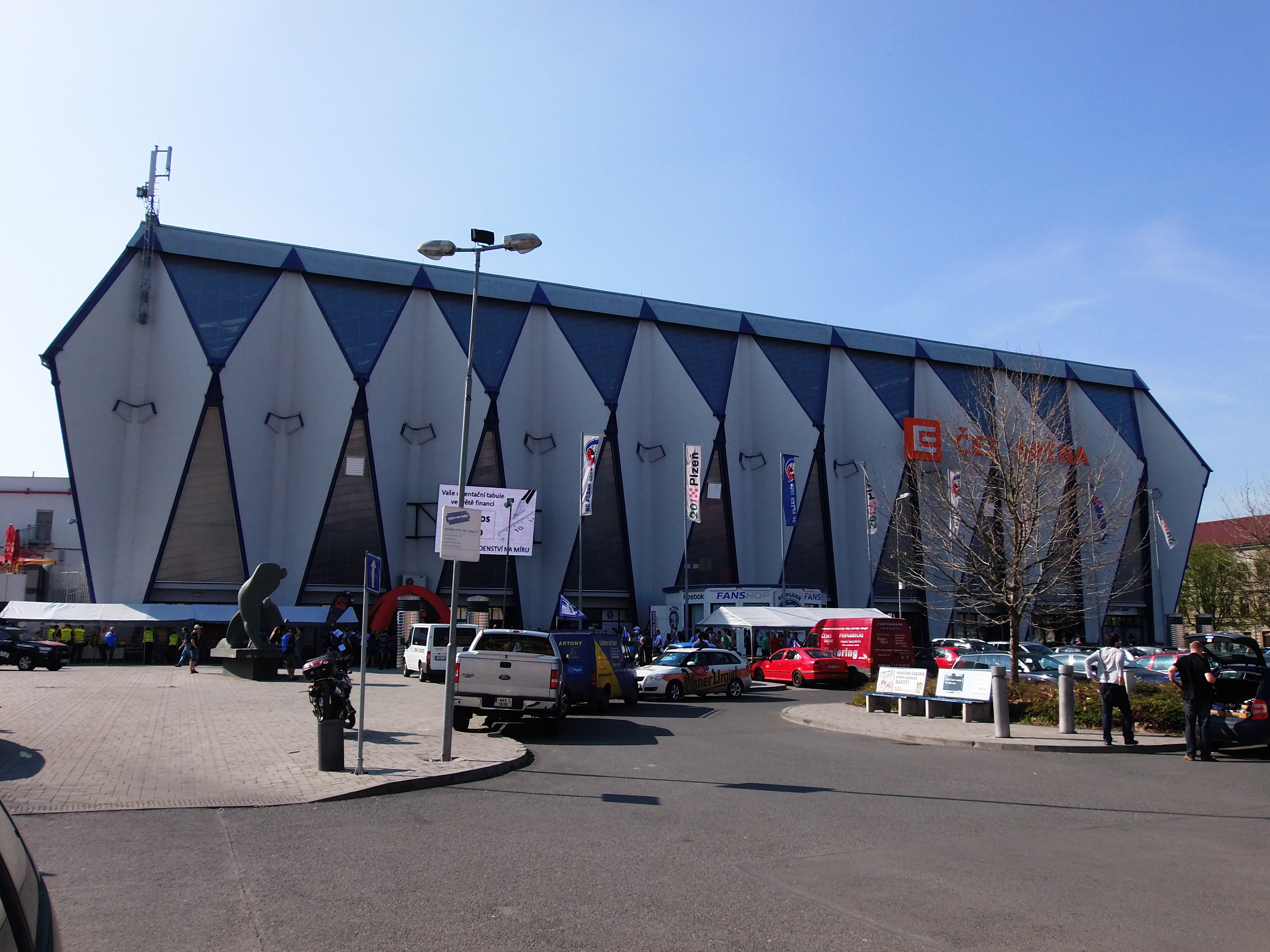 ČEZ Aréna Plzeň - hokejový stadión, na kterém hraje své zápasy HC Škoda Plzeň; pohled od východu